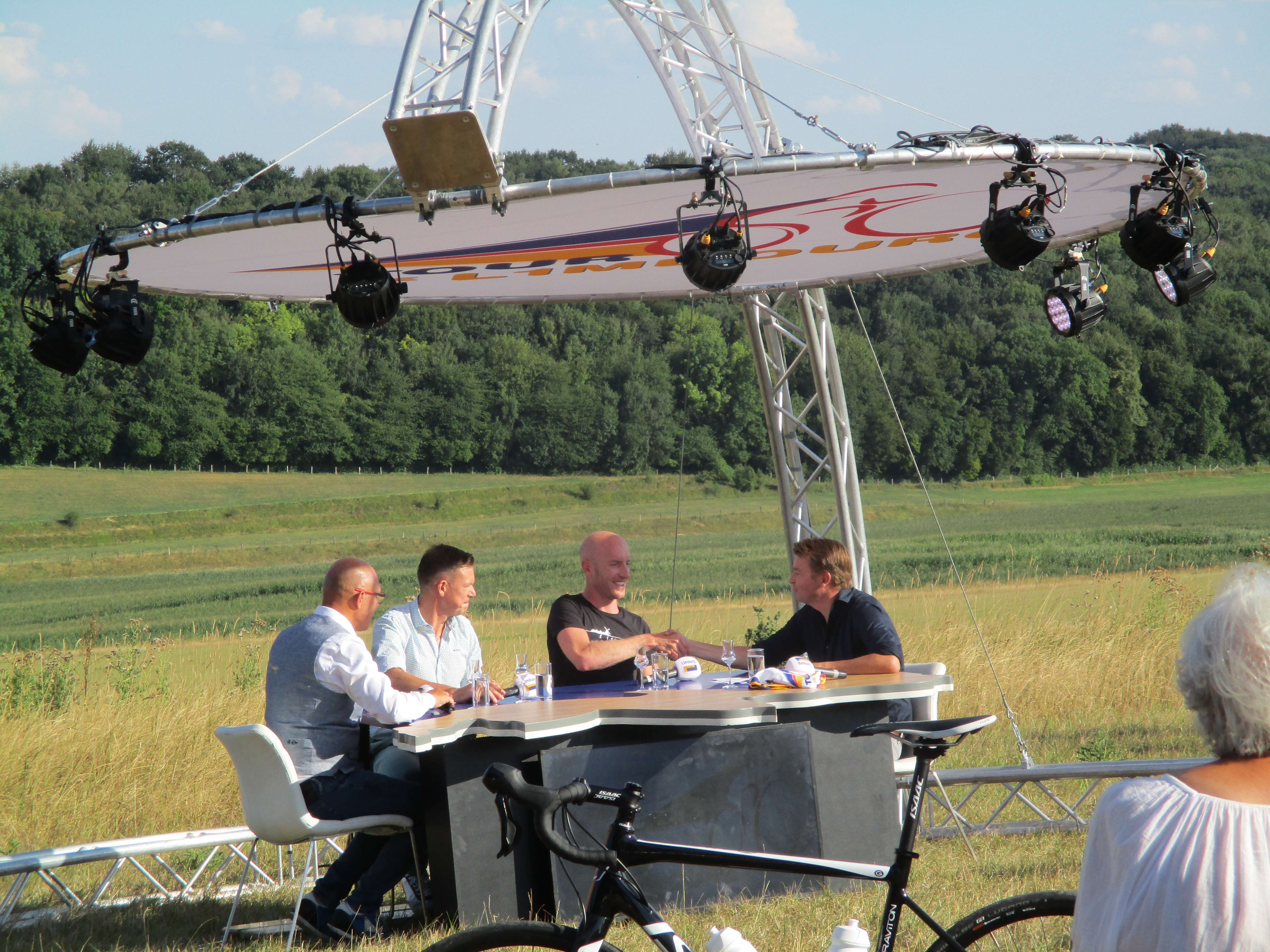 Tour de L1mbourg op de Gulperberg, 27 juli 2018